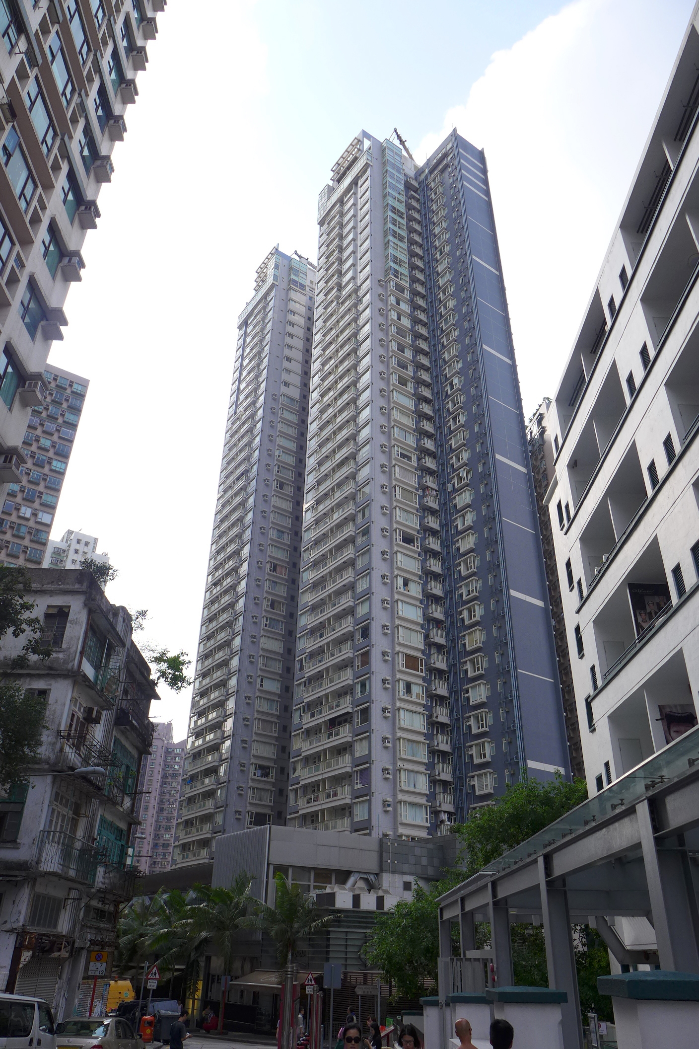 CentreStage